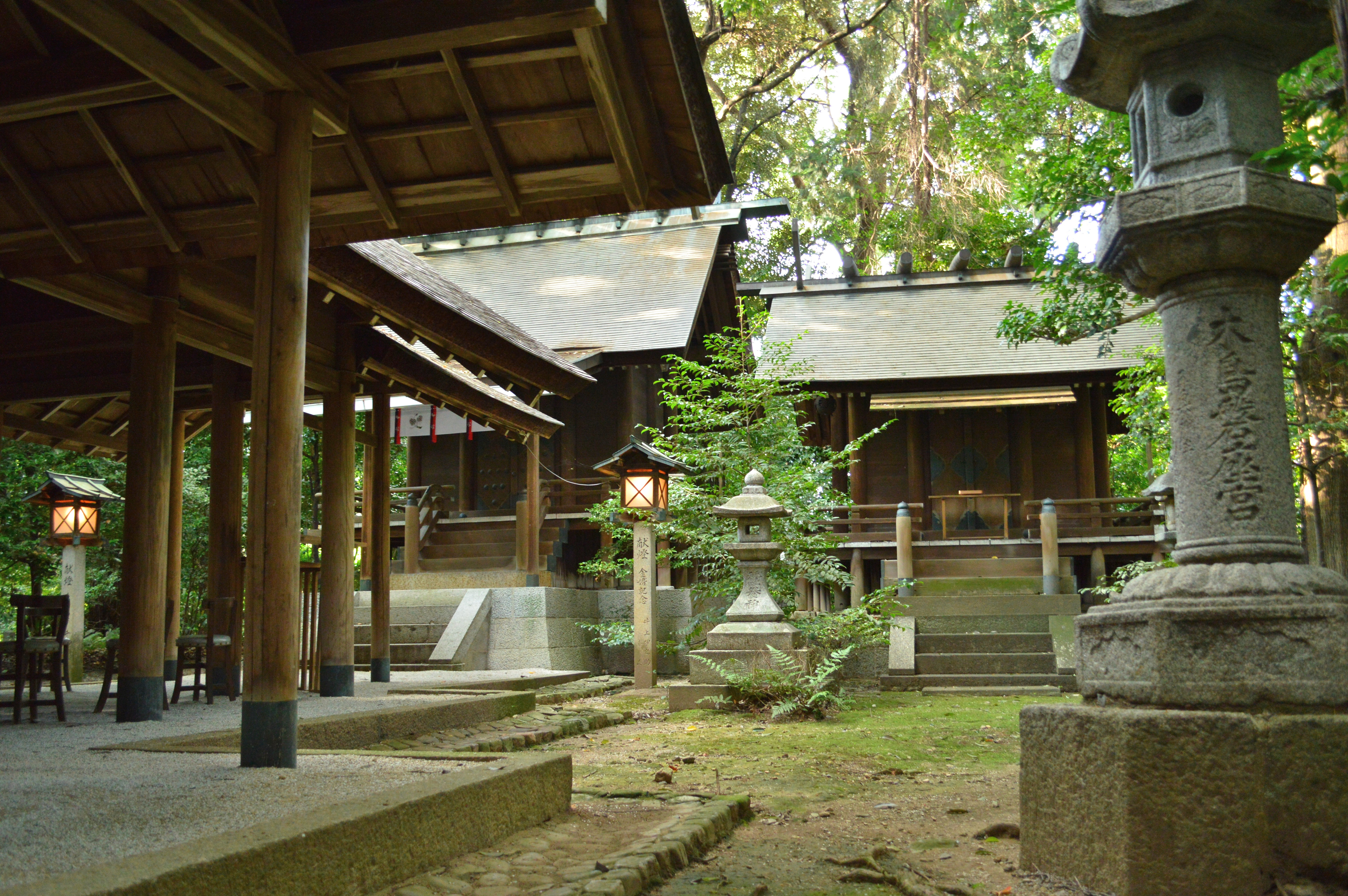 木嶋坐天照御魂神社 本殿と蚕養神社